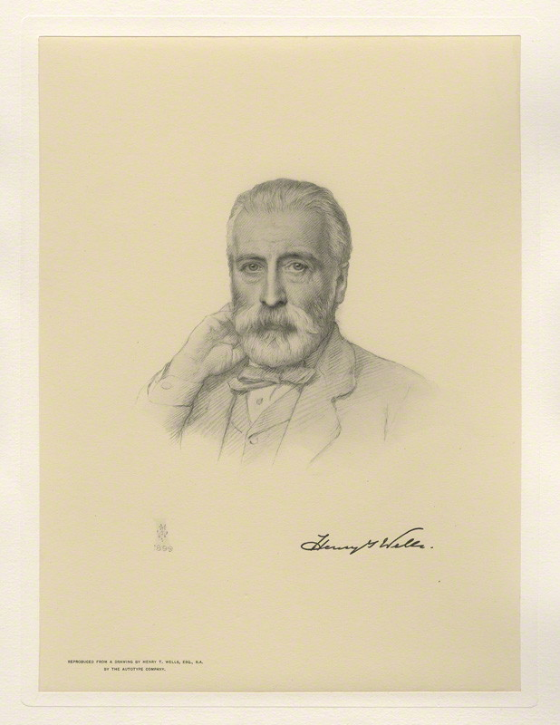 Self-portrait